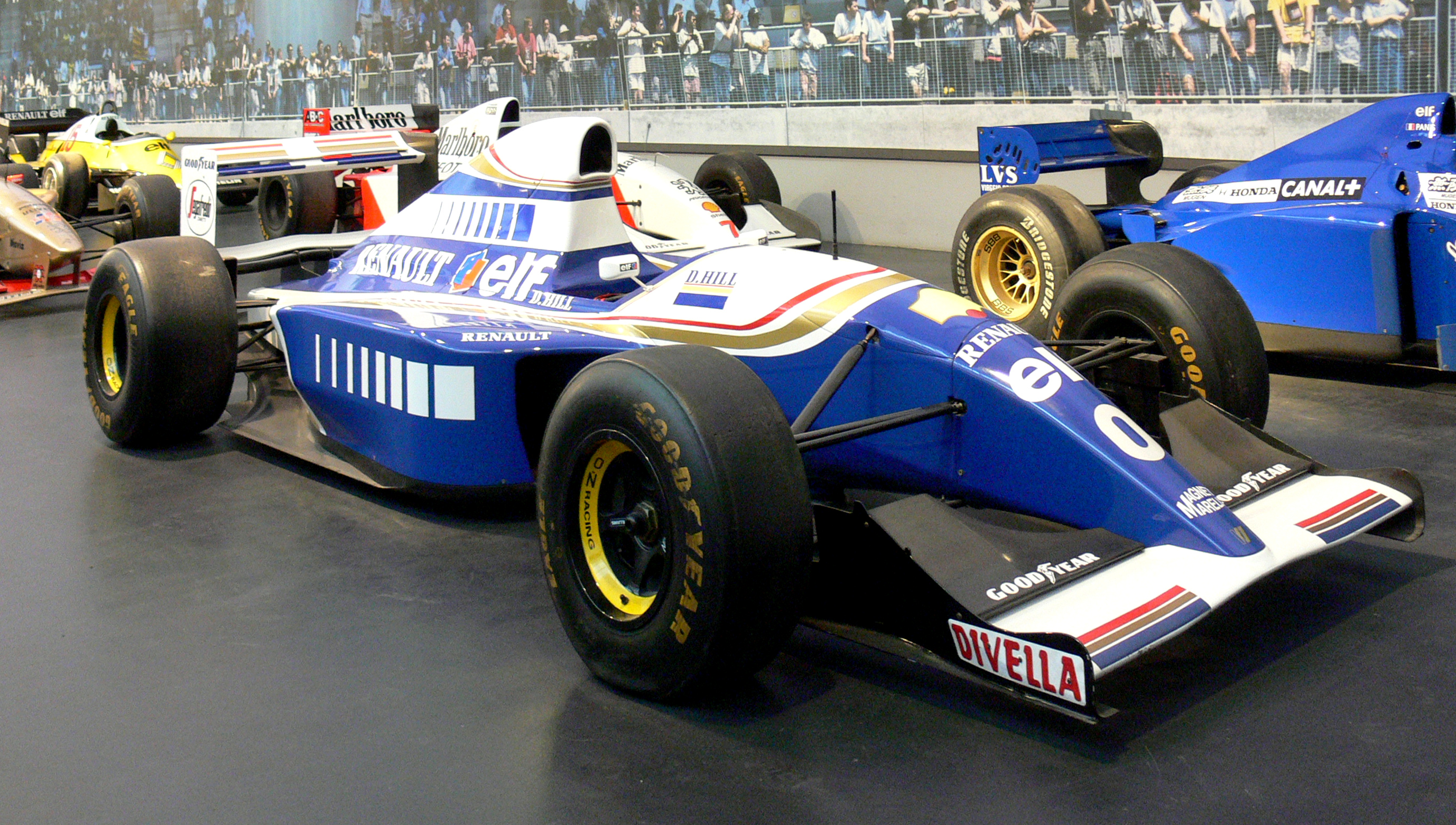 Williams-Renault FW16 im Musée National de l'Automobile (Mulhouse)